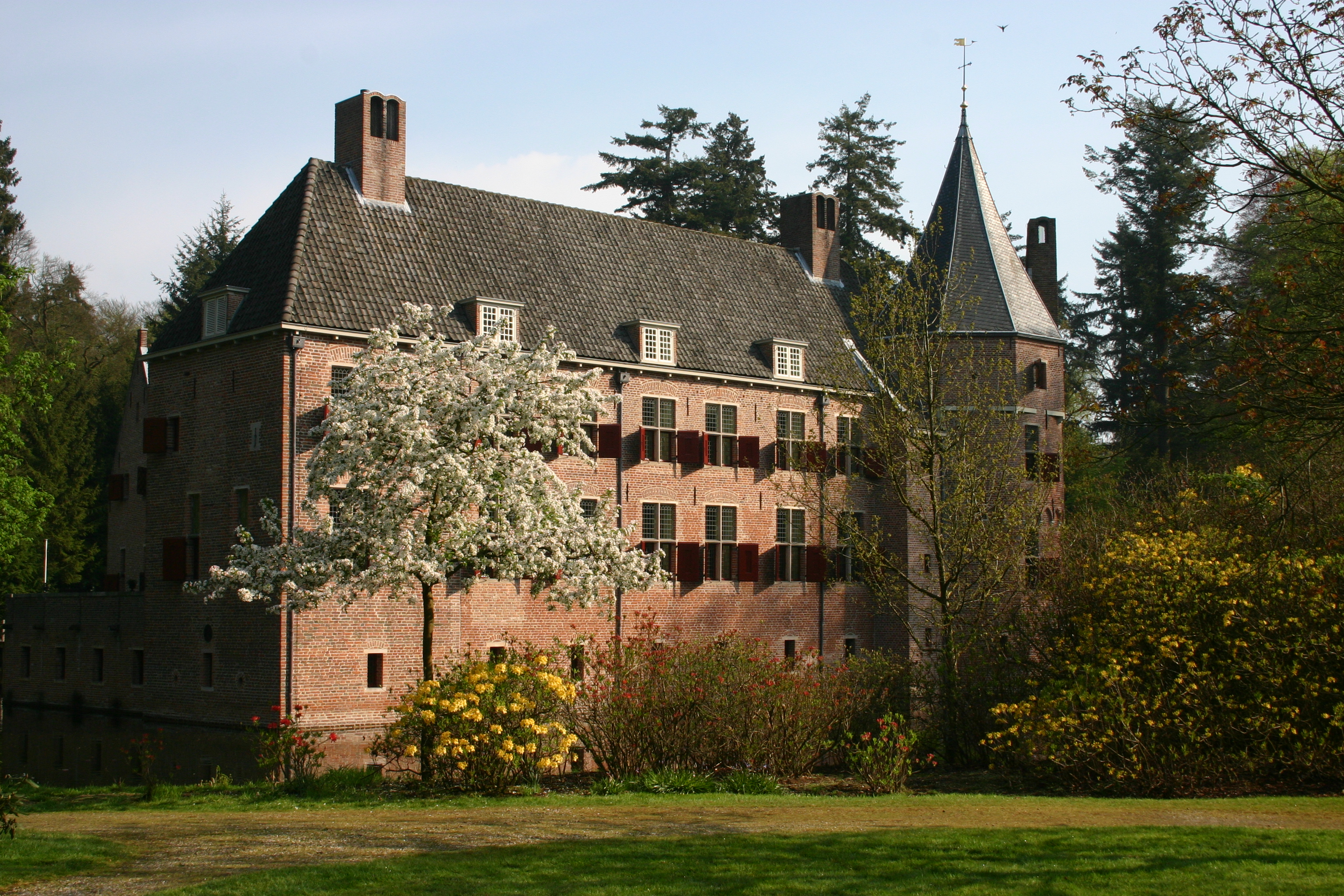 Kasteel het Oude Loo in het paleispark van het Loo te Apeldoorn